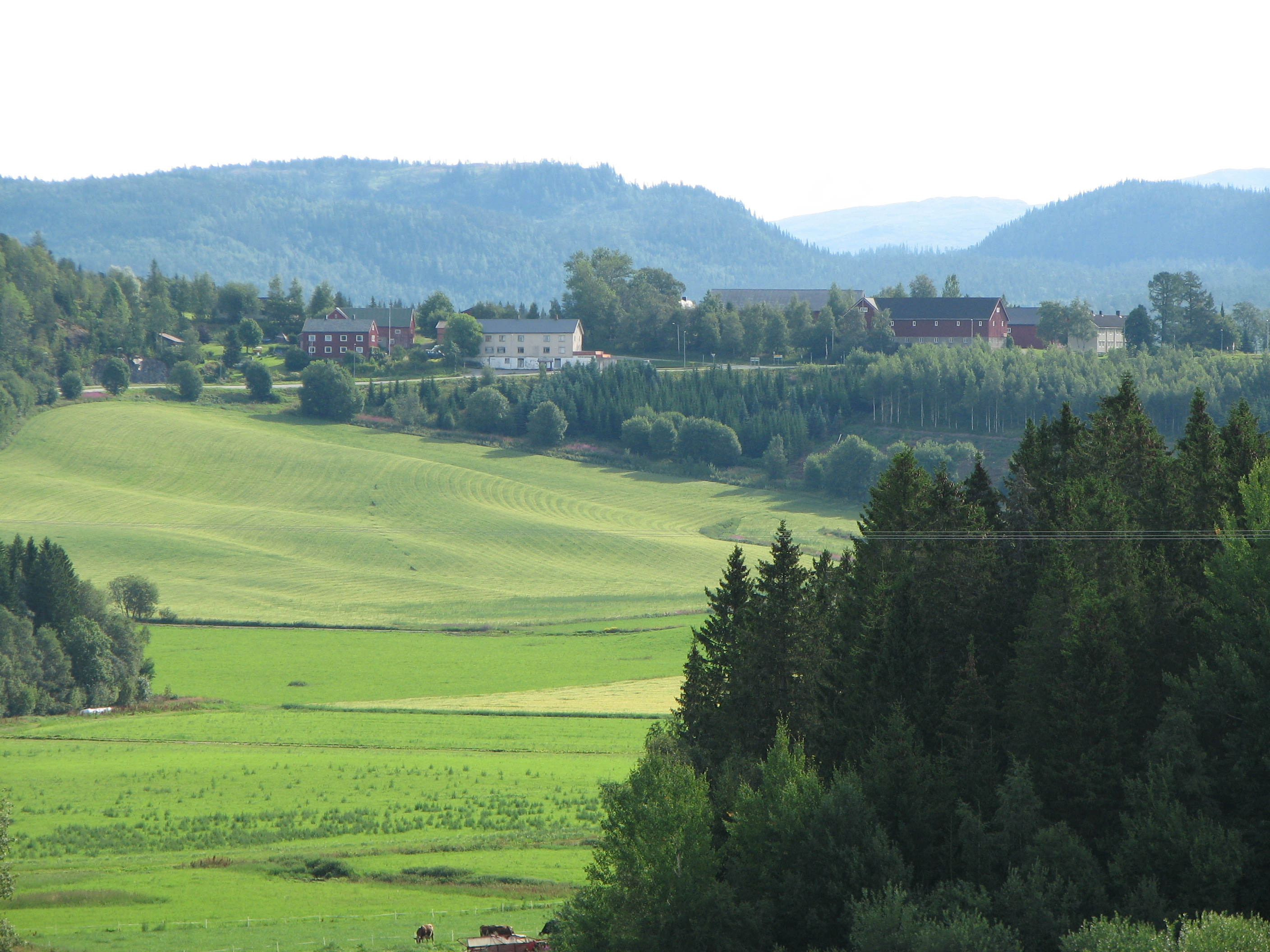 Utsikt mot Røysing fra Skei.